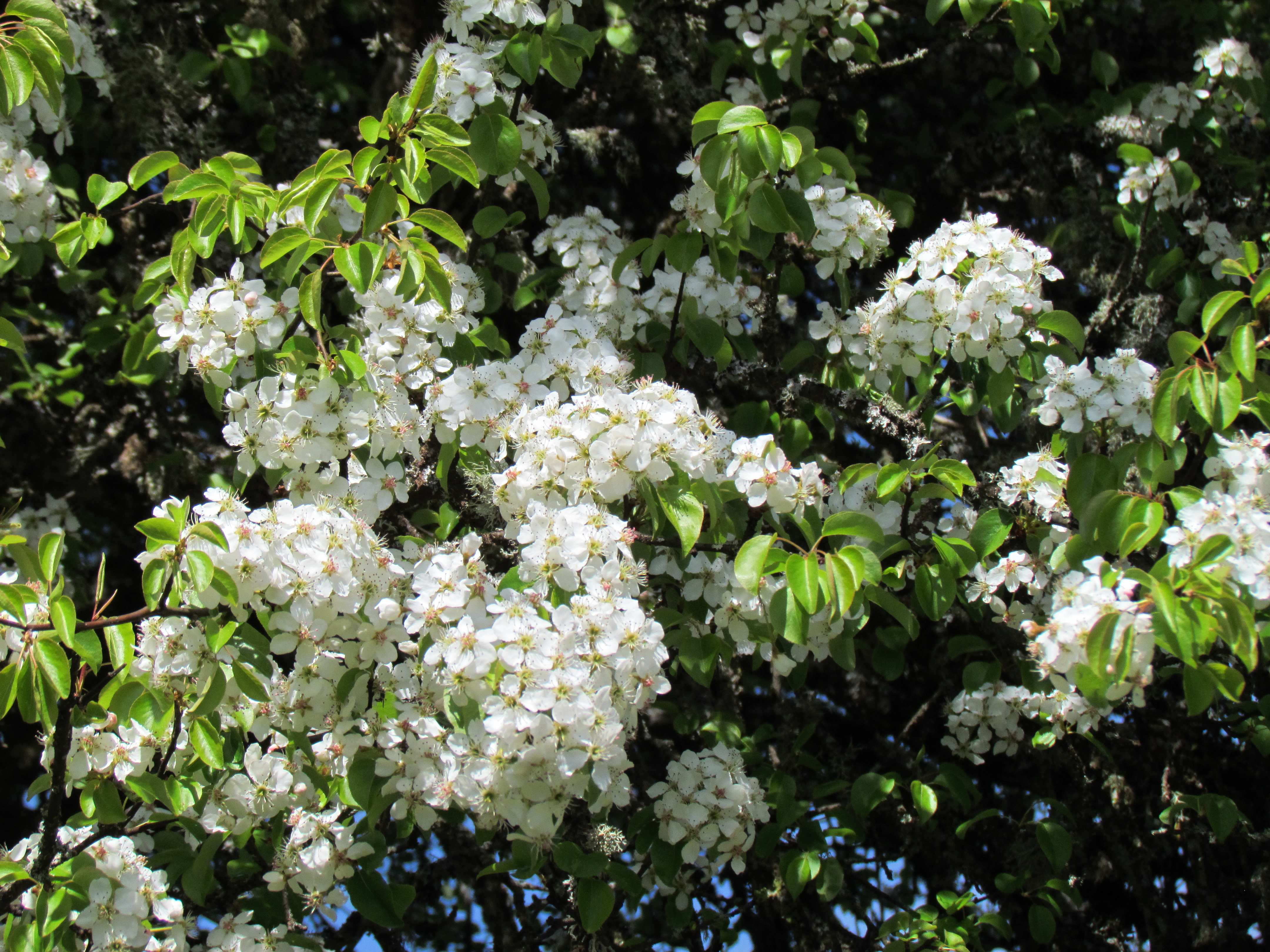 Poirier en fleur Printemps 2011 à Ambrugeat (Corrèze)